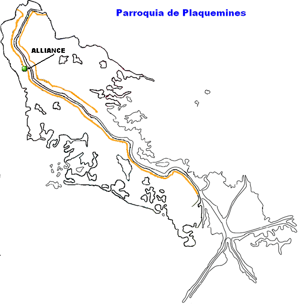 Mapa localizador de Alliance Louisiana